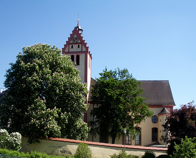 Altshausen, Germany: Schlosskirche